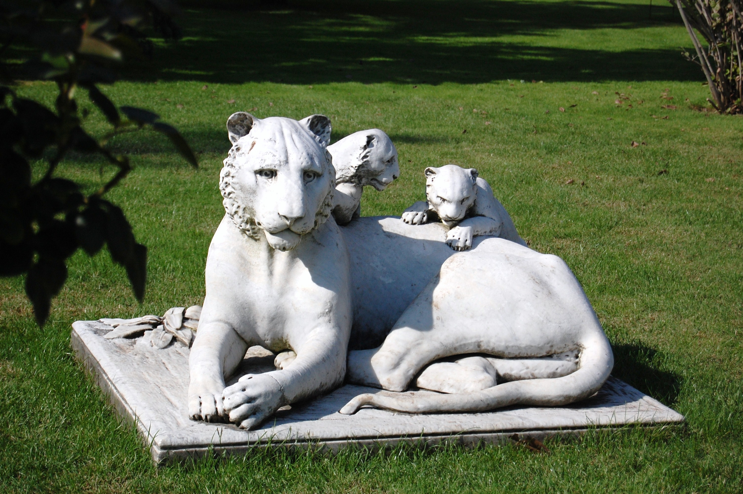 Lions